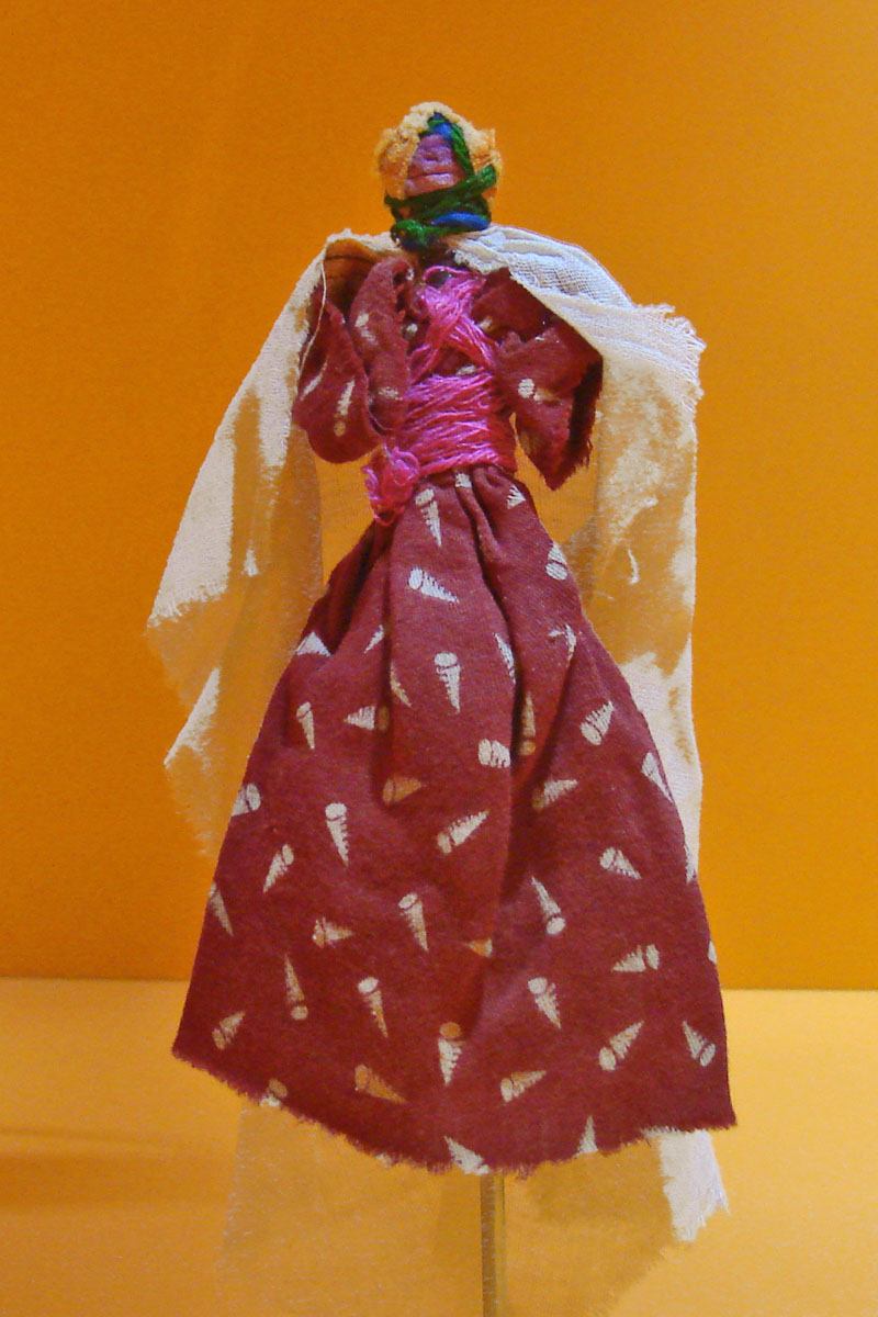 Poupée berbère (Haslit), bois, coton, laine, pigmentsMusée du Quai Branly, ancienne collection du musée de l'Homme. Germaine Tillion est décédée le samedi 19 avril 2008. Elle aurait eu 101 ans le 30 mai. Le musée de l'Homme rend hommage à cette femme d'exception qui a consacré sa vie à défendre la vérité et la justice. L'exposition présente l'itinéraire et l'engagement de cette ethnologue et résistante qui n'a cessé d'étudier et d'analyser le monde qui l'entourait et de combattre l'enfermement, l'esclavage, la pauvreté, la torture, la peine de mort... Le parcours de l'exposition retrace la vie de Germaine Tillion, ses combats et l'apport de son travail à l'ethnologie française. Des premières missions ethnographiques en Algérie dans les années trente, à l'étude de la condition des femmes dans le monde méditerranéen, l'exposition retrace également le rôle de Germaine Tillion au sein des premiers réseaux de Résistance, sa déportation à Ravensbrück, ses travaux sur les systèmes concentrationnaires, ou encore son retour en Algérie pendant la guerre d'indépendance.